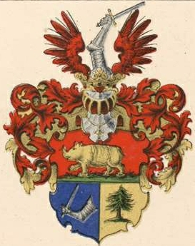 Panderi suguvõsa aadlivapp